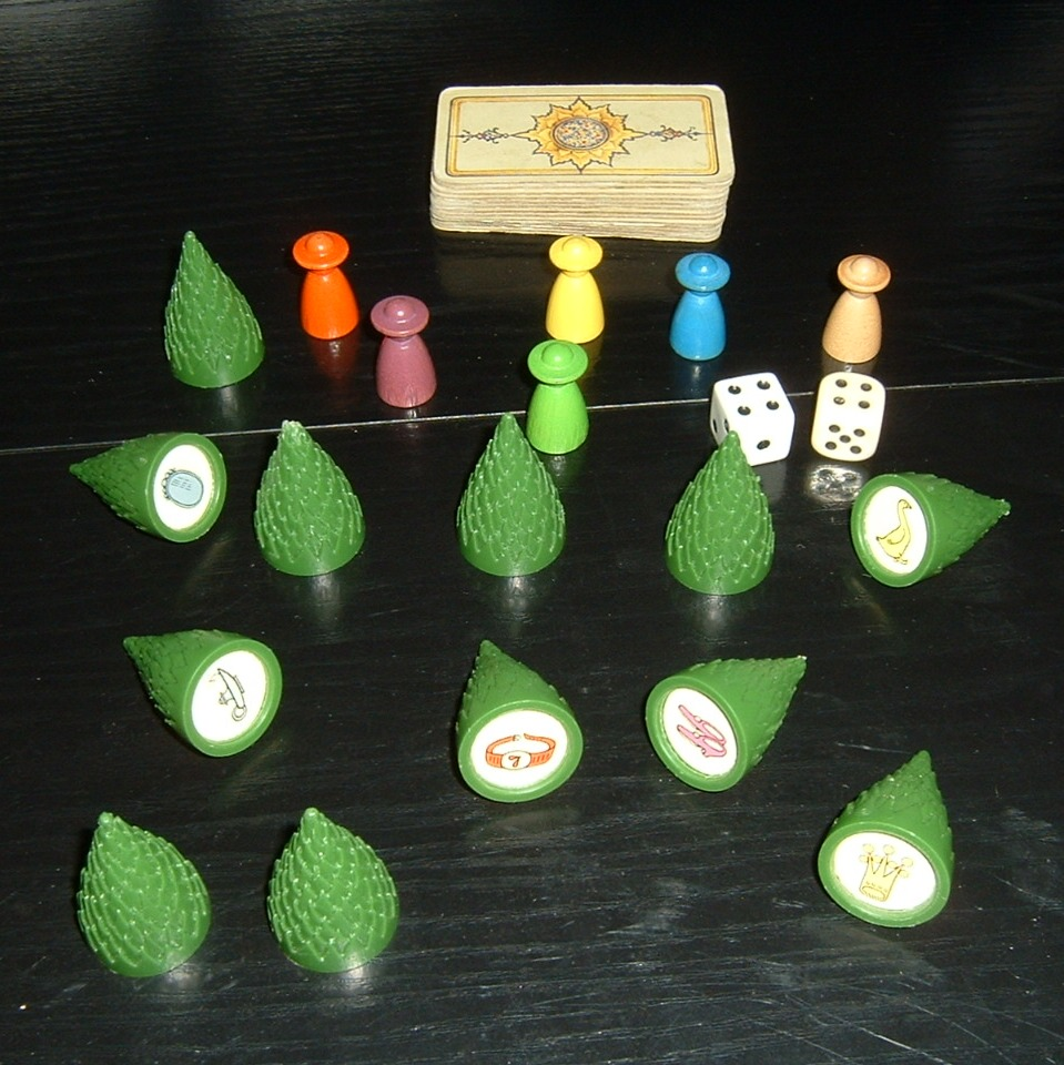 Zubehör des Spiels Sagaland (Tannenbäume, Pöppel, Karten)